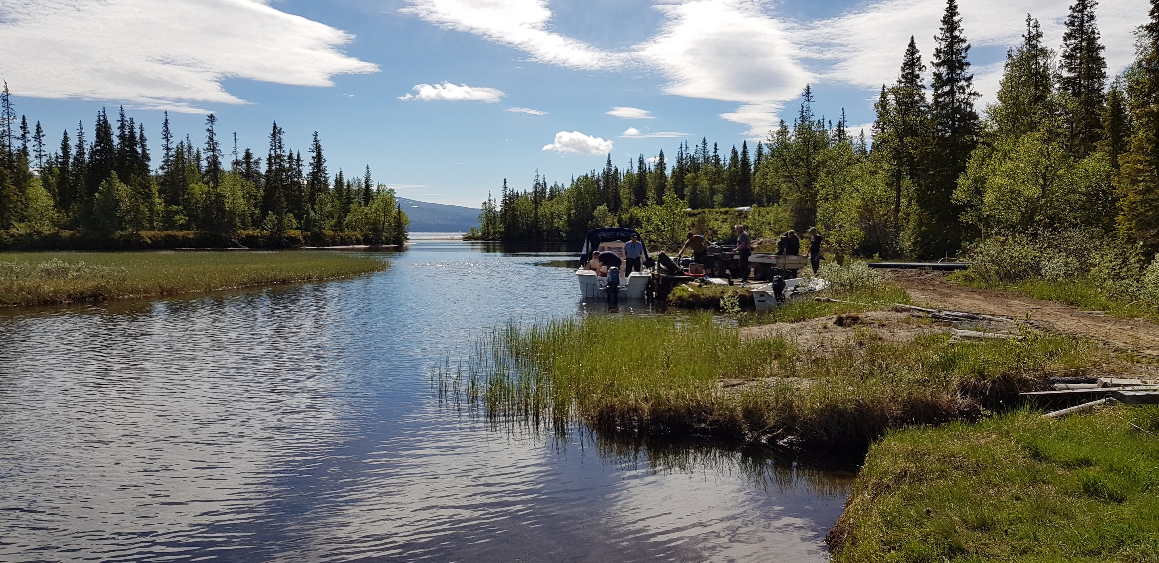 Fra Gjevsjøen ved Gjefsjøen Fjellgård. Foto: Lars Bugge Aarset